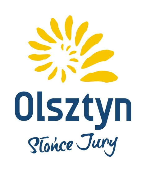 Logo Gminy Olsztyn, znajdującej się na terenie województwa śląskiego, które obowiązuje od 2010 roku.